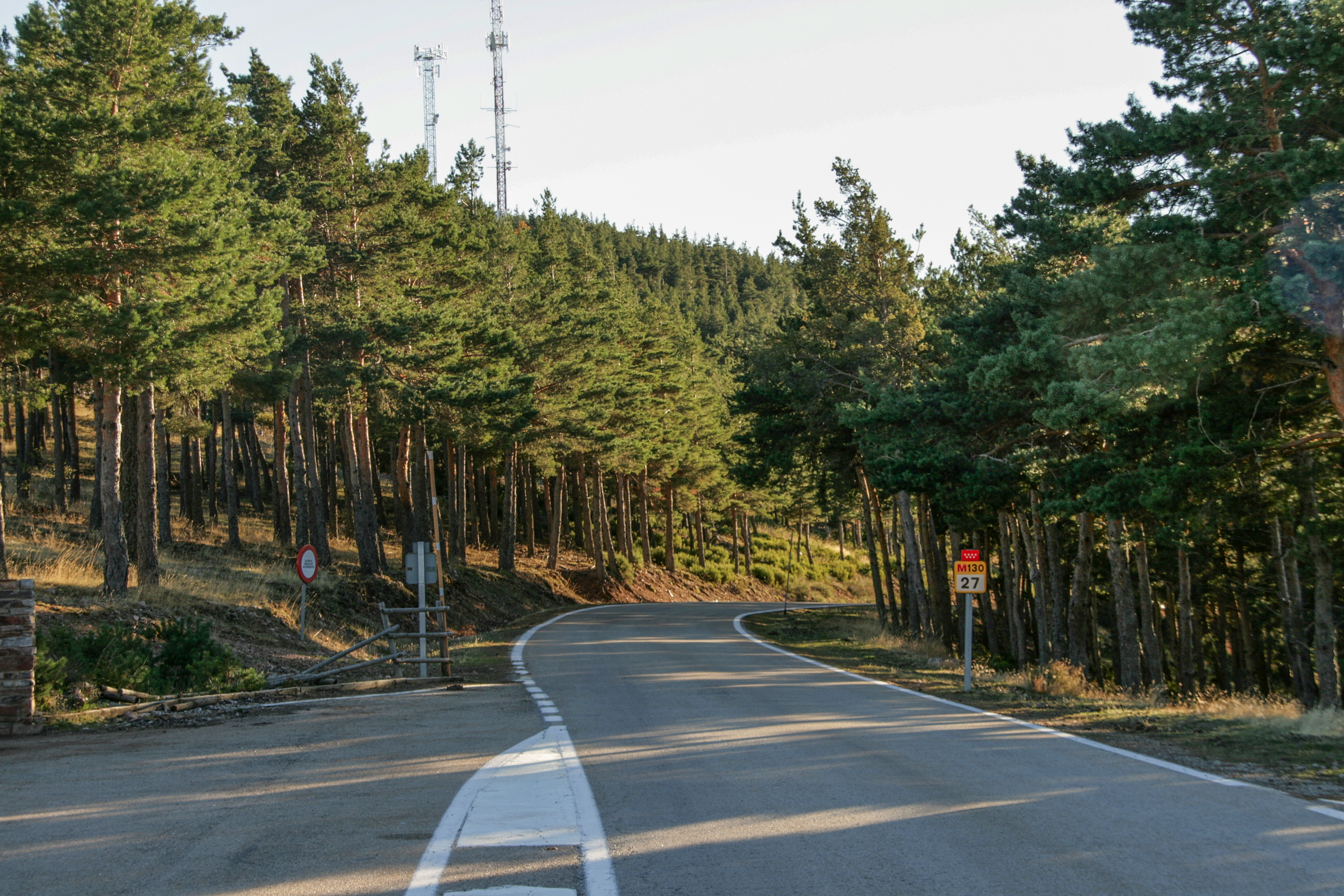 Km 27 de la carretera M130, entre Puebla de la Sierra y Robledillo de la Jara This is a photography of a Site of Community Importance in Spain with the ID: ES3110002. Natura2000 entry, EEA entry